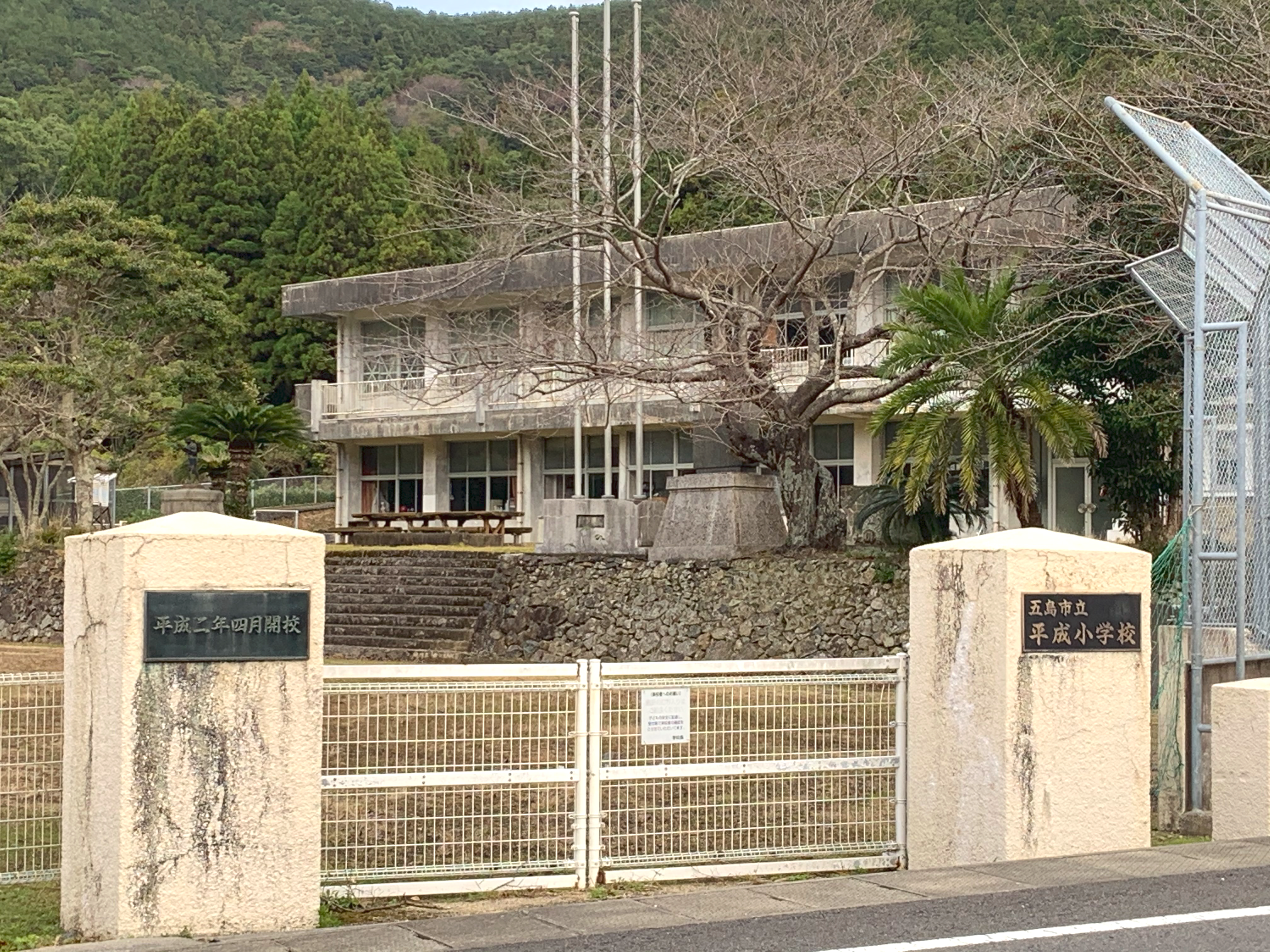 五島市立平成小学校正門。2019年廃校。